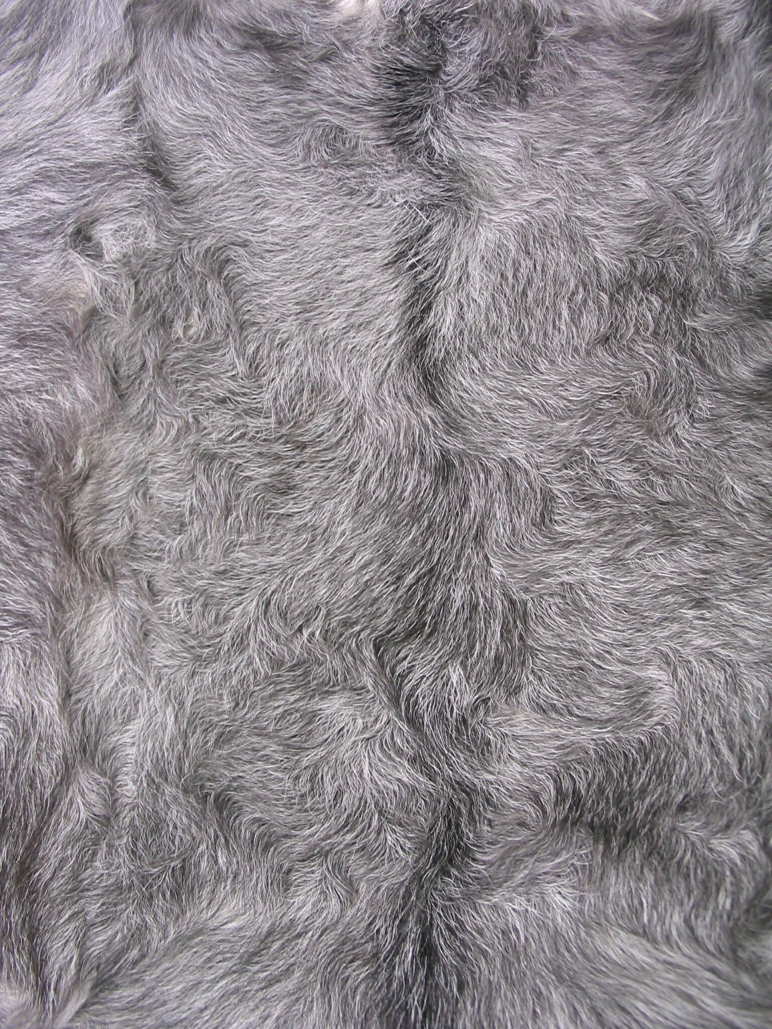 Kid skin China, grau gefärbtes Zickelfell (Fellbezeichnung im Rauchwarenhandel = Kid), China, Ausschnittsfoto aus einer Felltafel